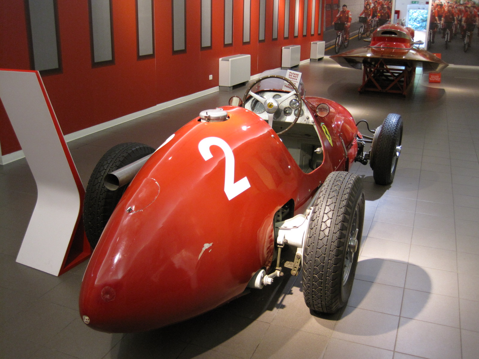 Automobiles in the Galleria Ferrari